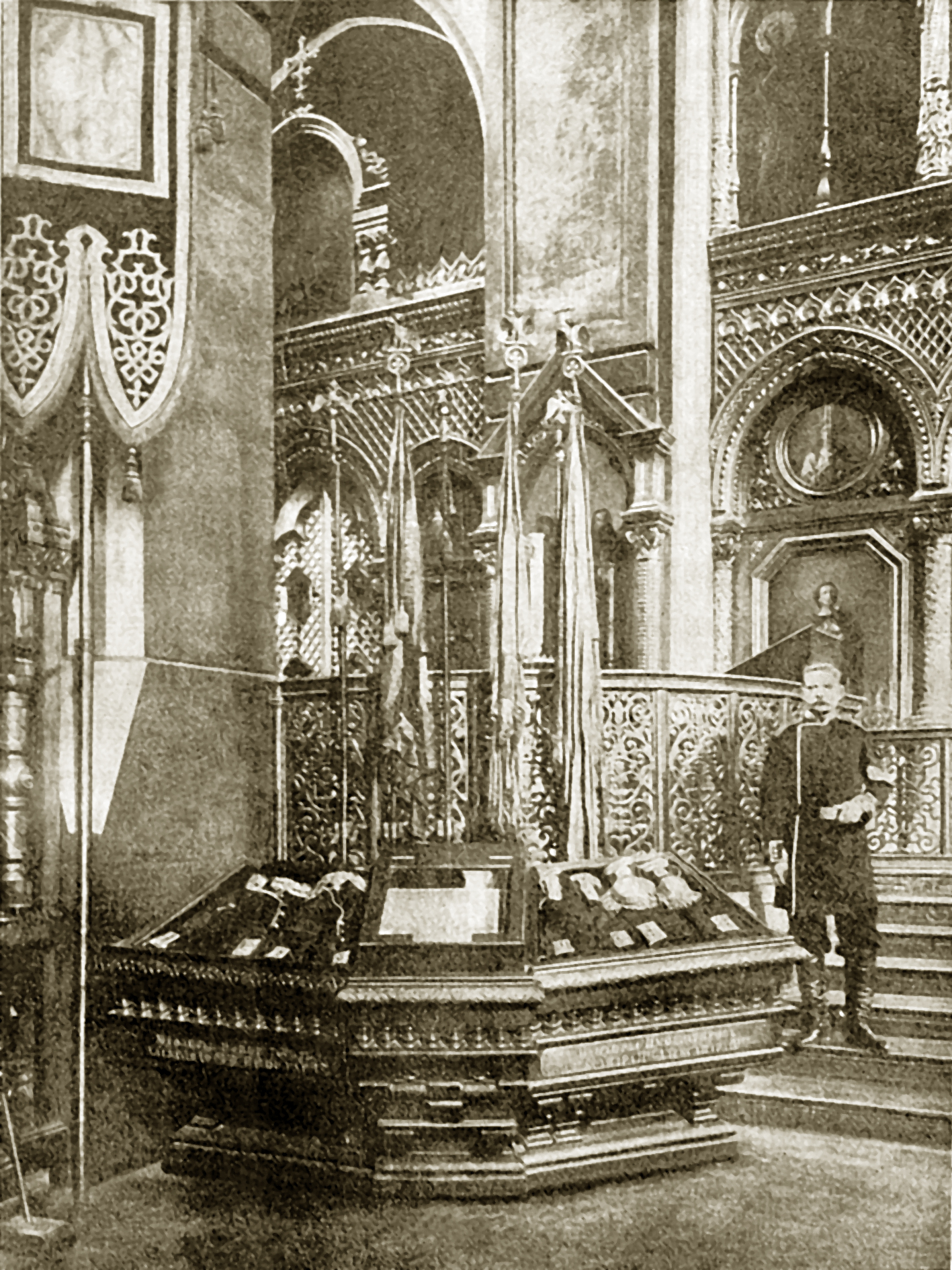 Витрина с реликвиями лейб-гвардии Егерского полка в храме св. Мирония